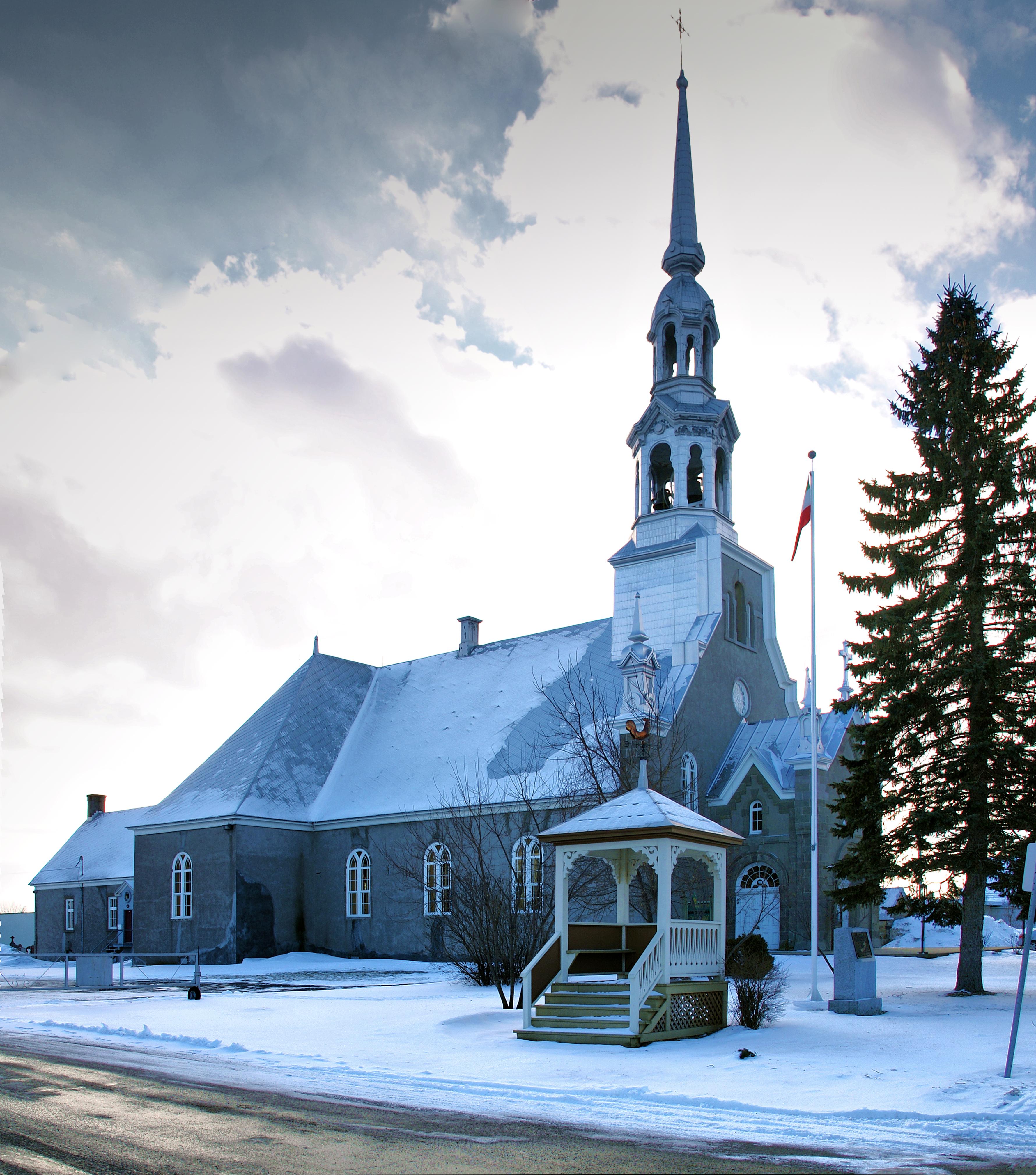 Saint-Jean-Baptiste, Montérégie (Québec) - L'église